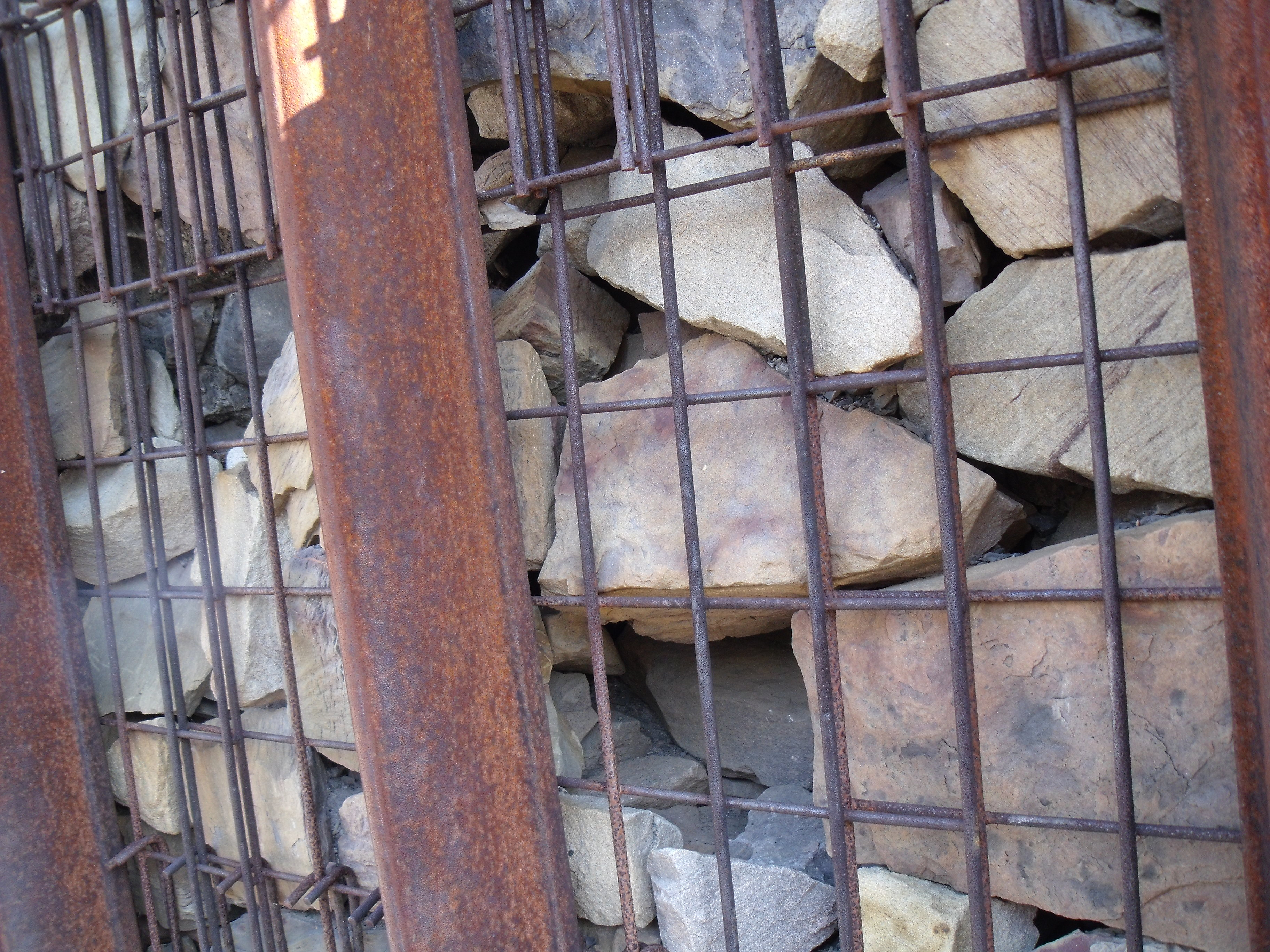 Foto eines Verzuges mit Verzugsmmatten